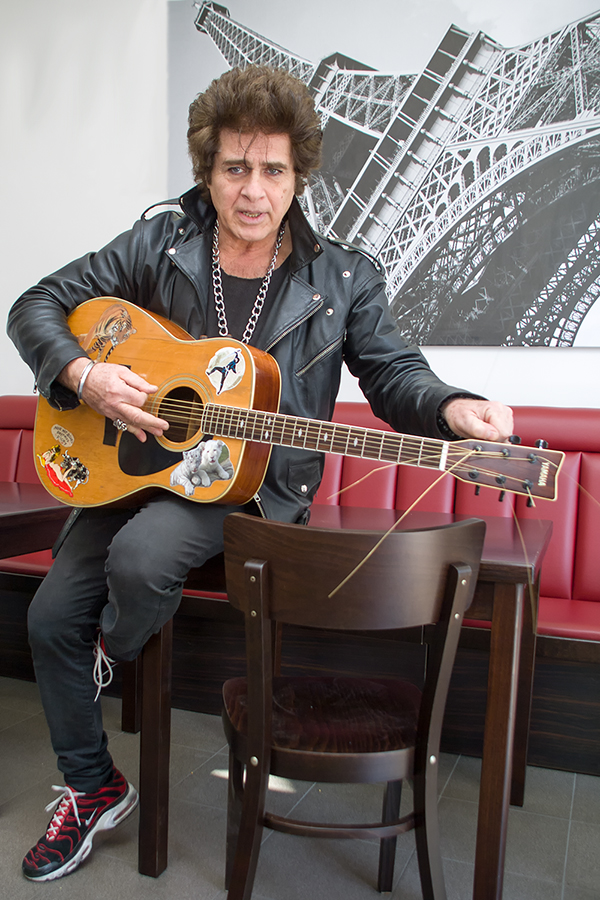 Ricky Shayne in seinem ehemaligen Kiosk an der Flurstraße in Düsseldorf-Flingern.Lizenz: Creative Commons CC-BY-SA-3.0 - Namensnennung MICHAEL SCHILLING erforderlich.